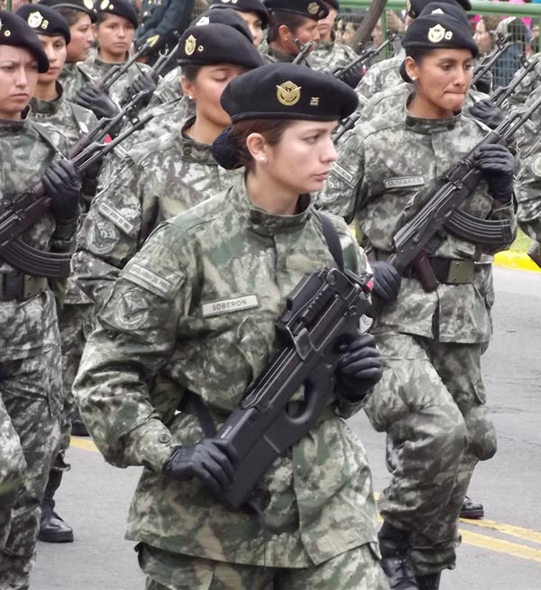 Fusil FN P90